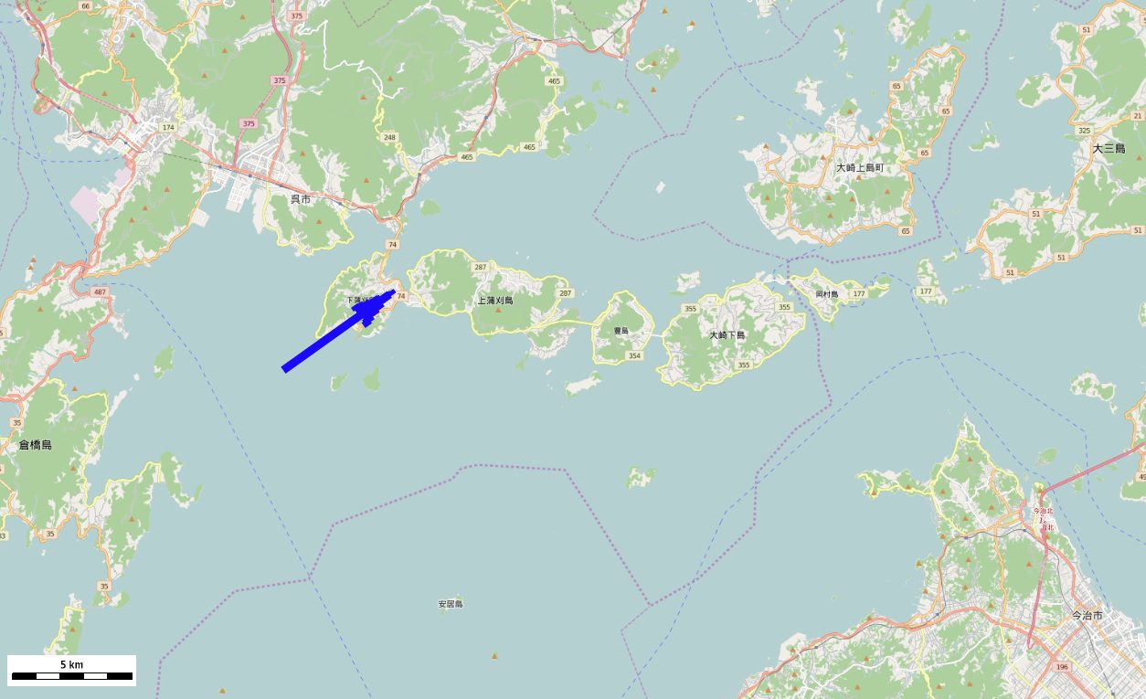 2015年の地図に広島県下蒲刈島三之瀬地区を示したもの。 This map may be incomplete, and may contain errors. Don't rely solely on it for navigation.